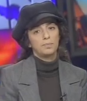 تصویری از گفتگوی صدای آمريکا با مسيح علی نژاد در ۳۱ اوت ۲۰۰۹